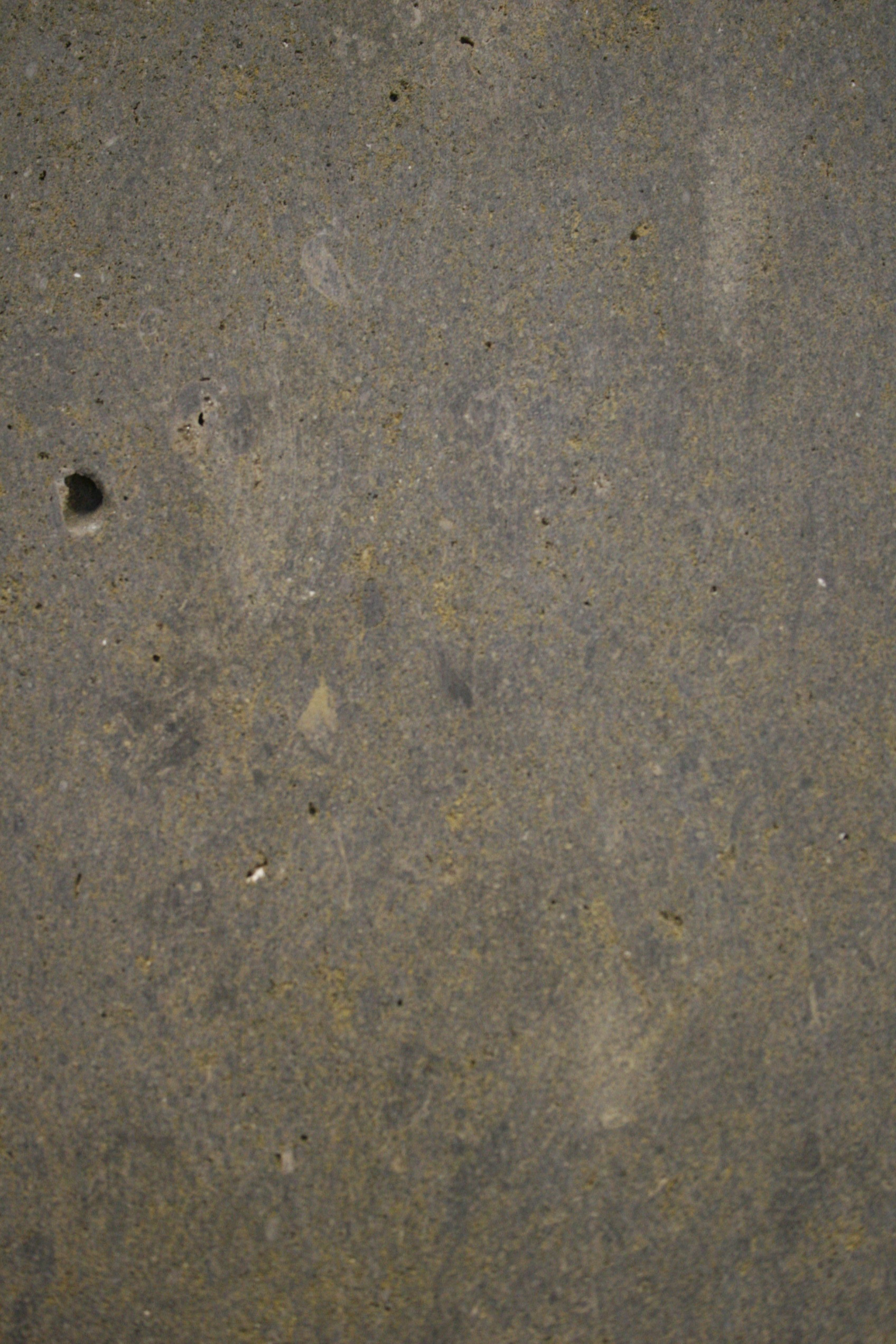 Salzhemmendorfer Dolomit (Handelsname), Salzhemmendorfer Korallenoolith, Maße 22 x 14, Oberfläche geschliffen